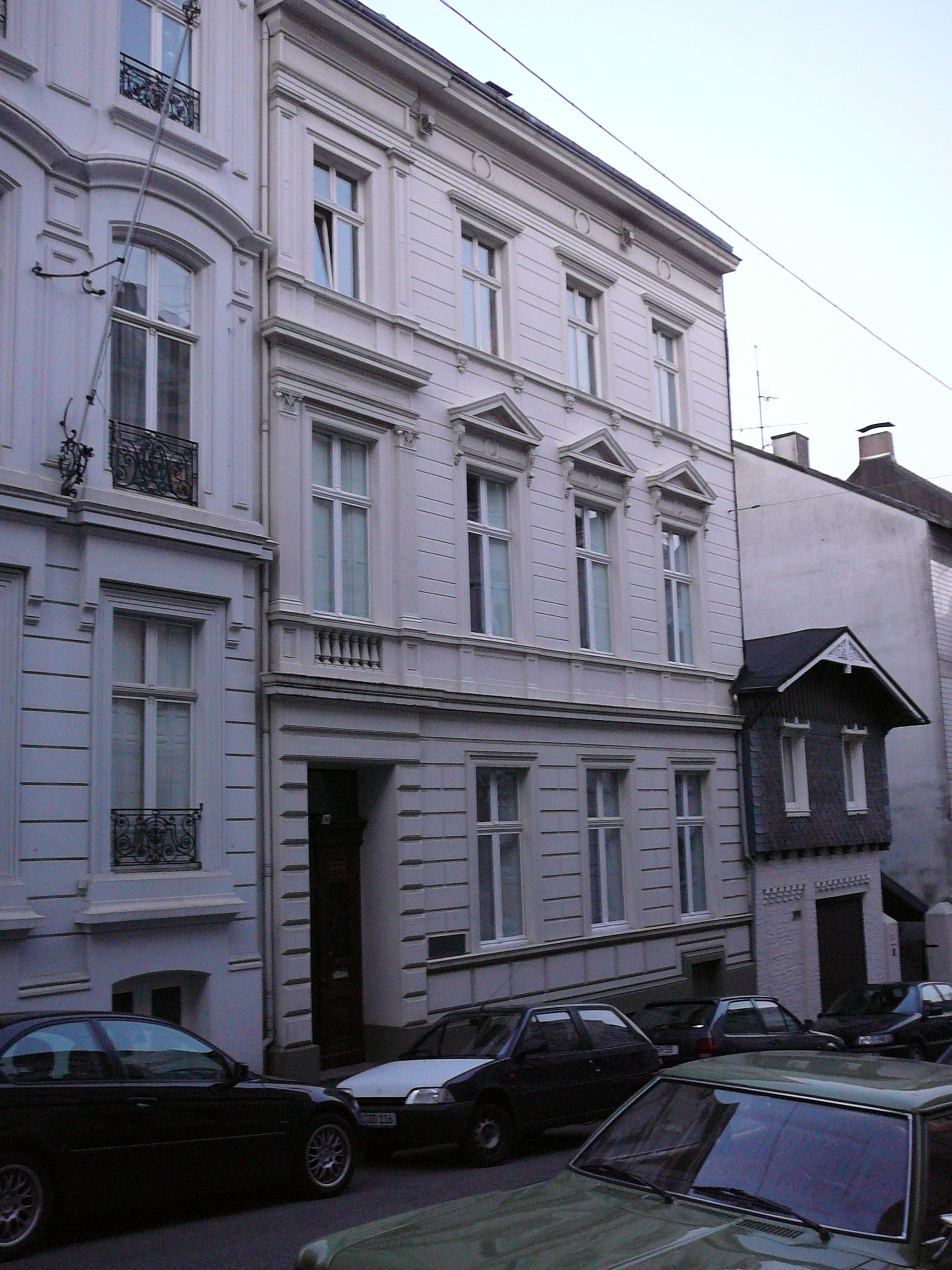 Wohnhaus Von-der-Tann-Str. 10, Wuppertal